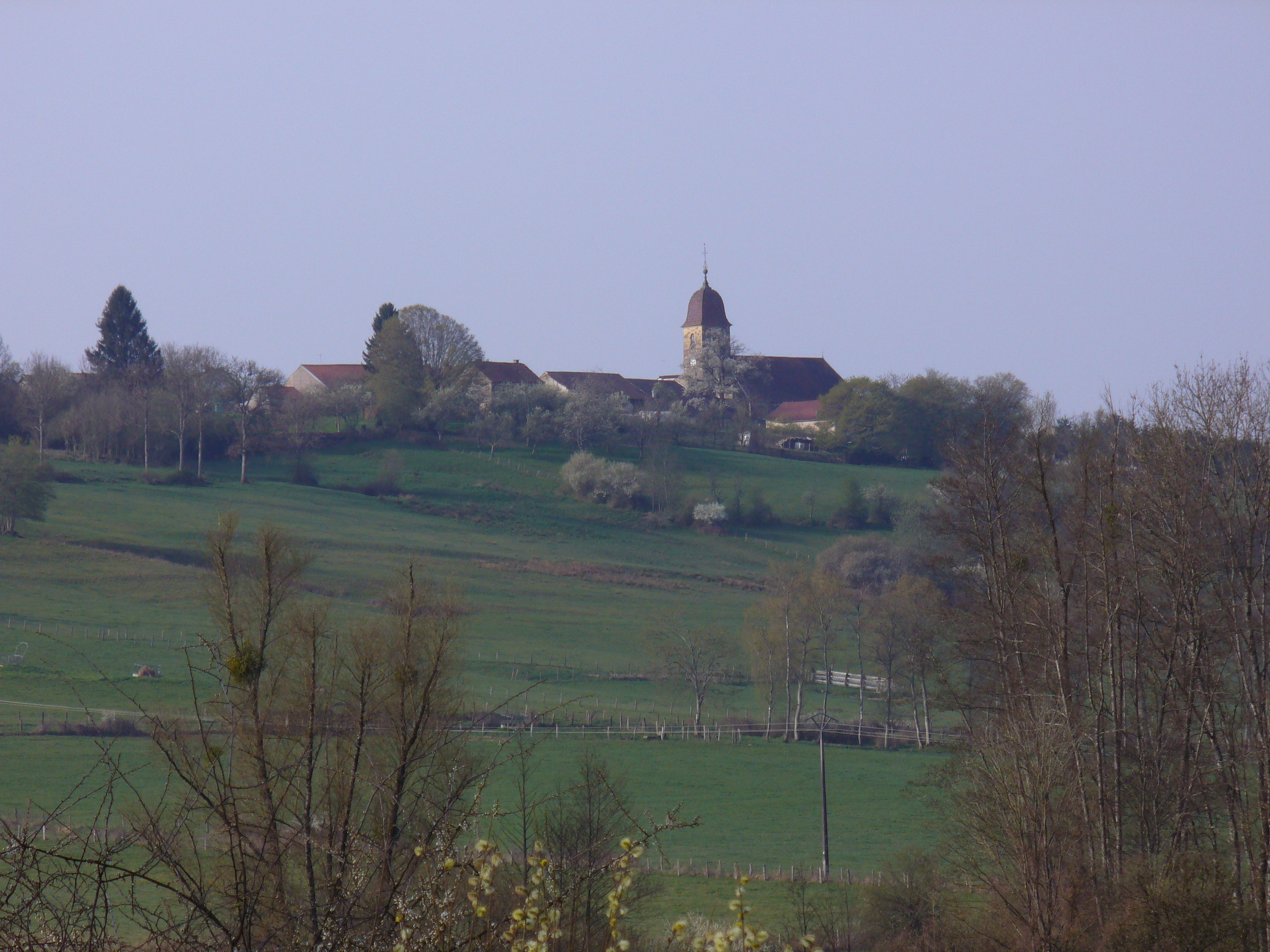 Dampierre Les Conflans Vue coté RD 30